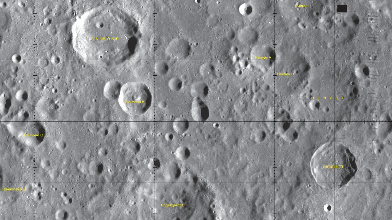 Cráter lunar Dirichlet. Localización (Imagen LRO)